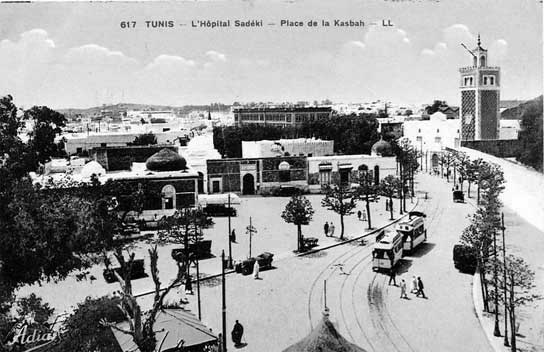 Place de la Kasbah et Hôpital Sadiki (actuellement Hôpital Aziza Othmana), Tunis, Tunisia